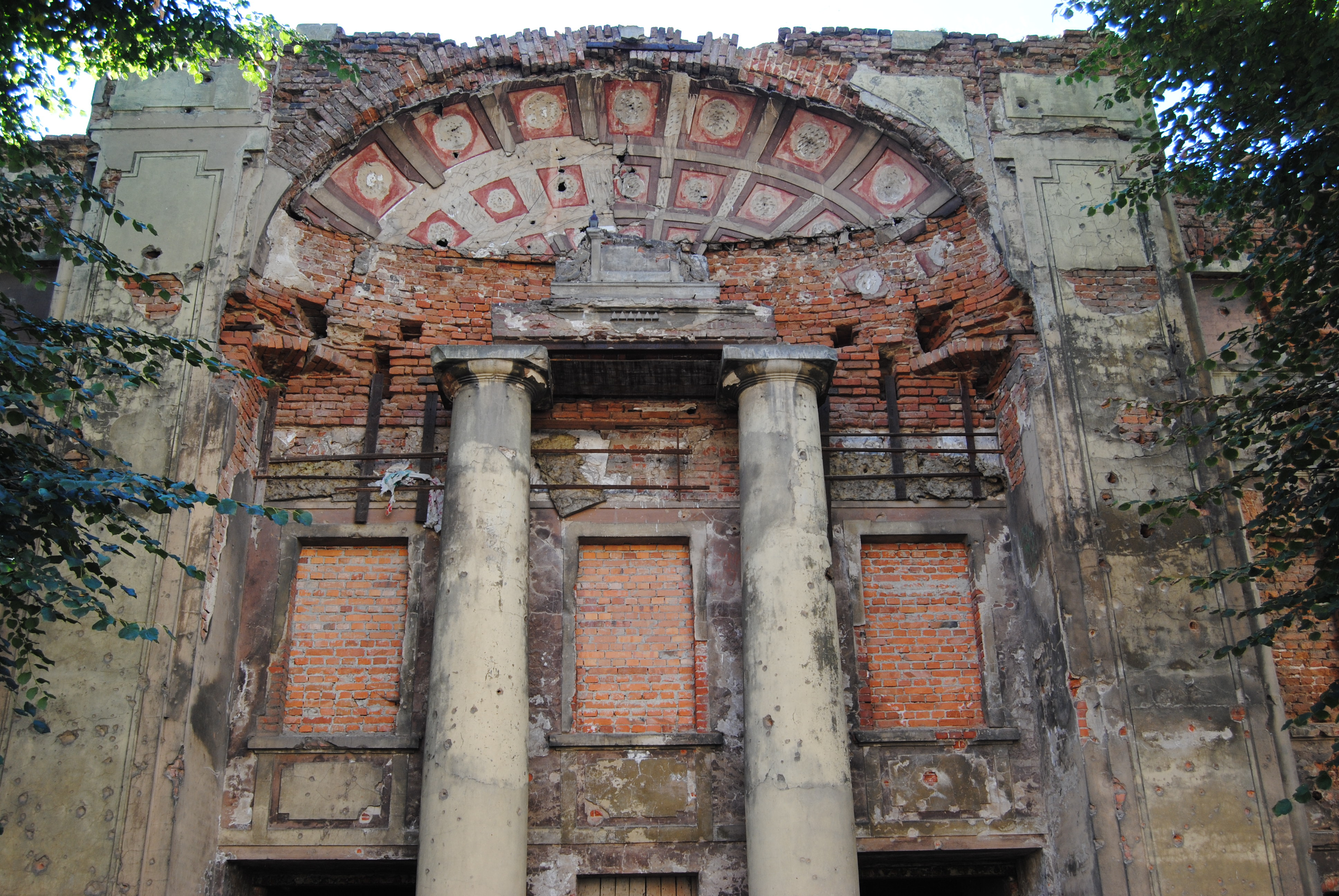 Głogów, teatr (ruina), 1799-1801